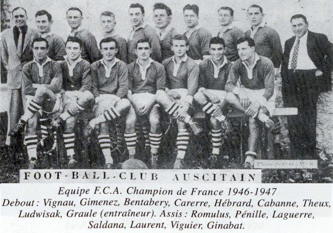 Le Football club auscitain champion de France de 2e division (1947 - Honneur), p.76.